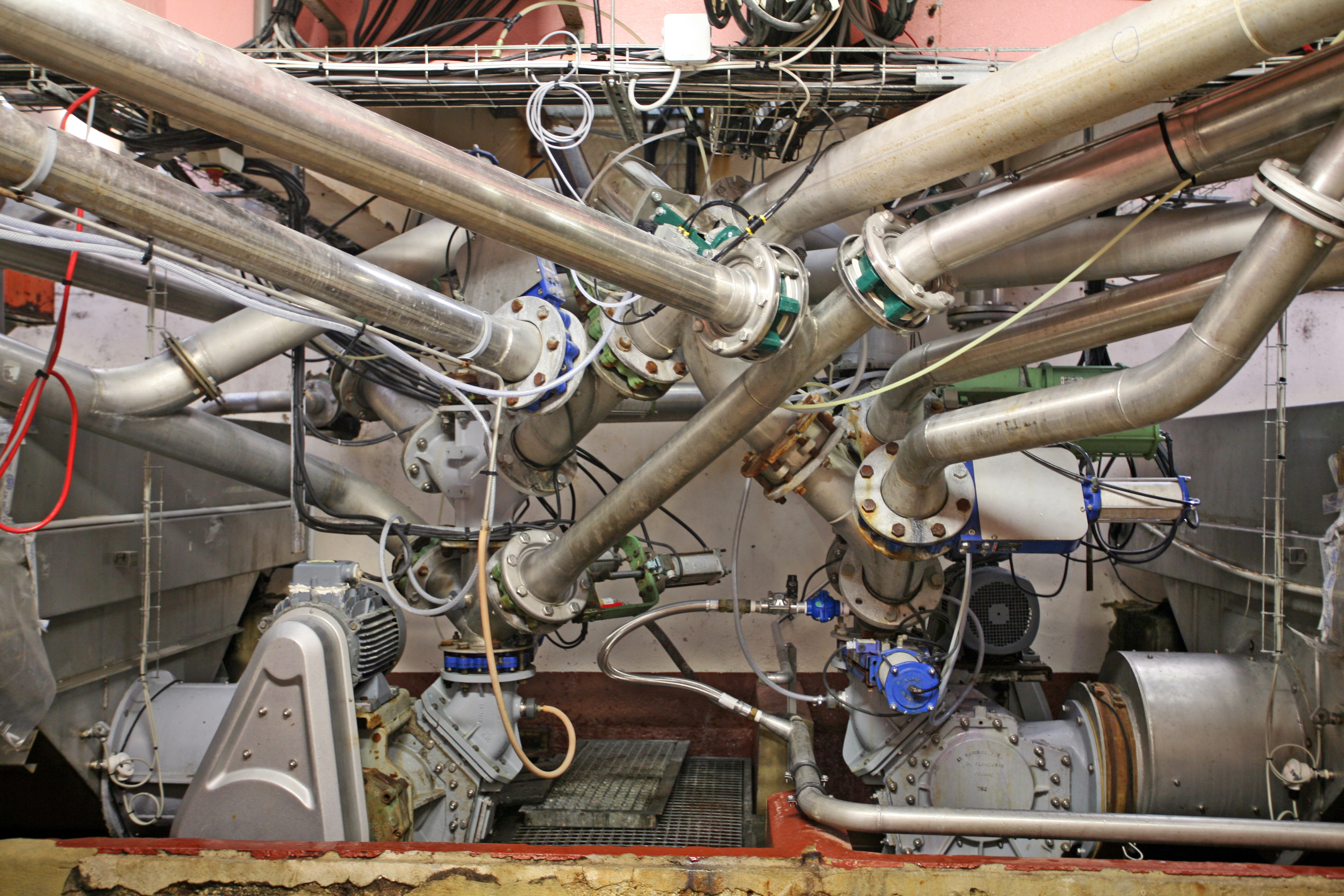 Ventilknoten zur Mostverteilung in der cave de beaumes de venise, Vaucluse, Frankreich